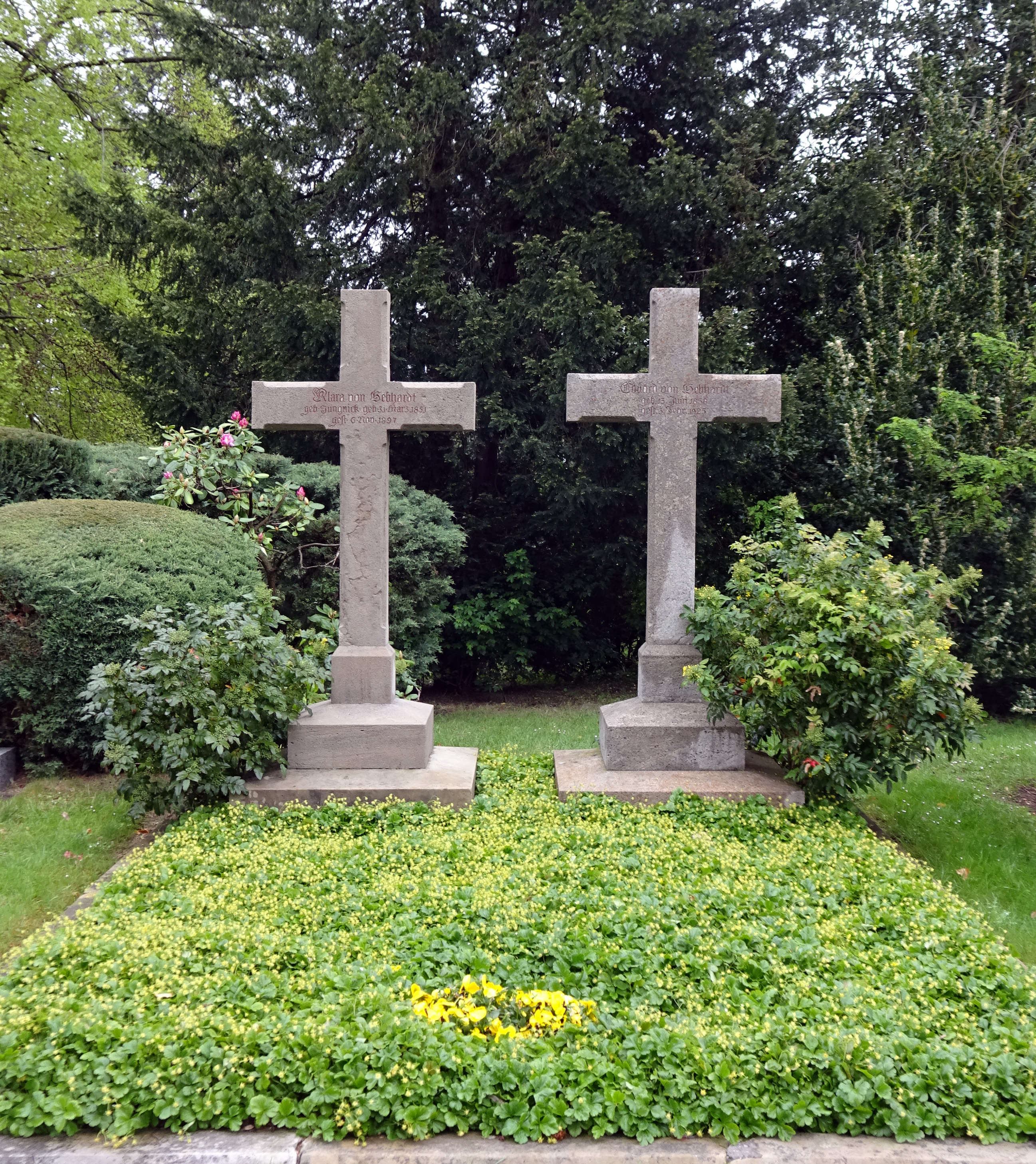 Grabstätte von Gebhardt, zwei Kreuze mit Inschrift, auf dem Millionenhügel Nordfriedhof Düsseldorf